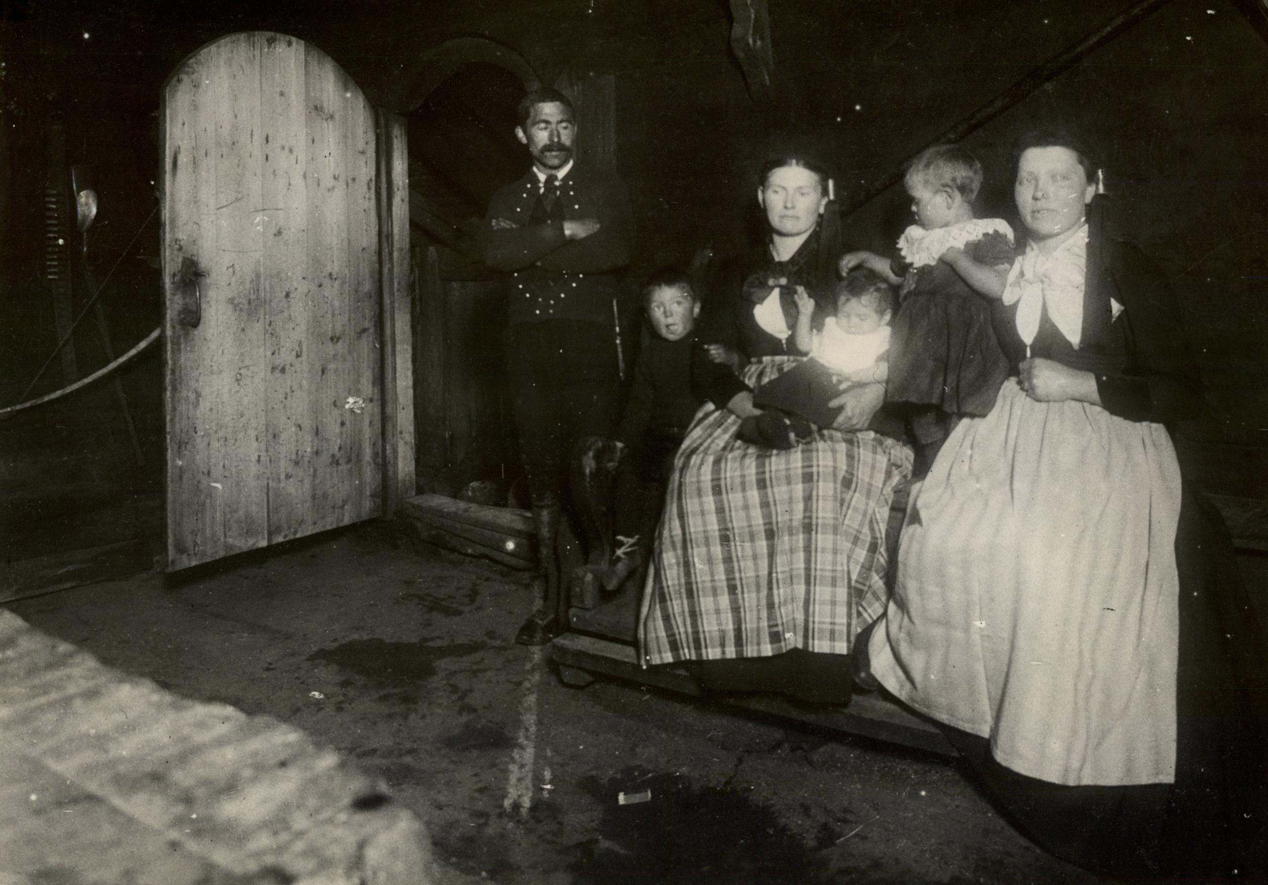 Kongsbonde Joanis Patursson med familie i kongsgården blokstue. Paturssons kone er islandsk født.